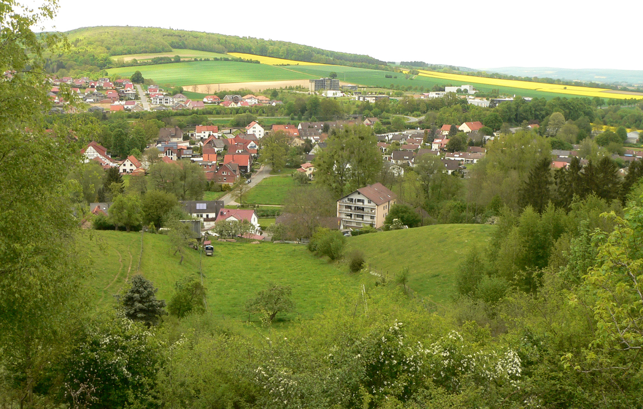 Landschaftsschutzgebiet und Geotop Dütberg, Blick auf Rohrsen